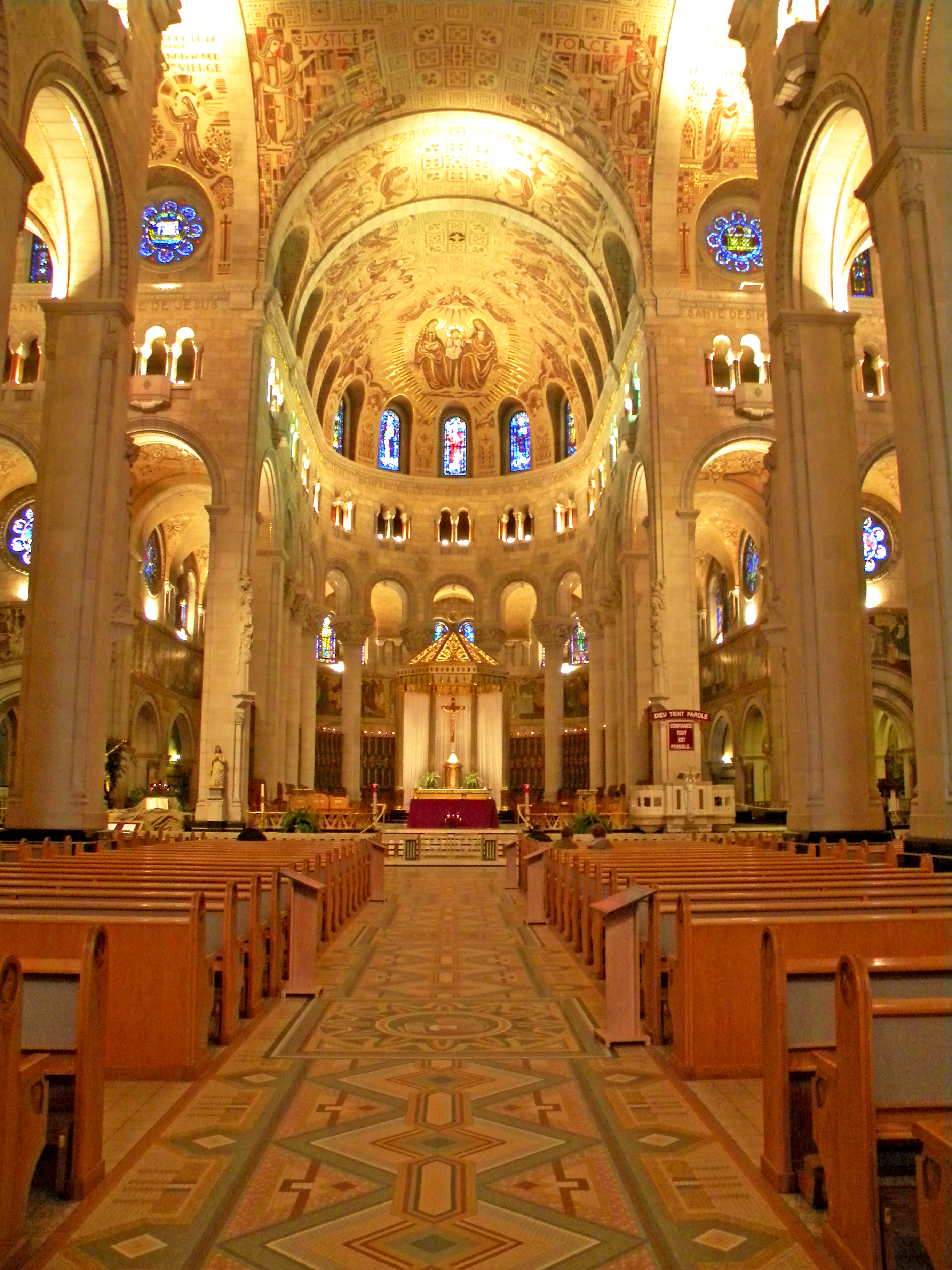 Basilique Sainte-Anne-de-Beaupré (Ste-Anne-de-Beaupré basilica), Québec, Canada.